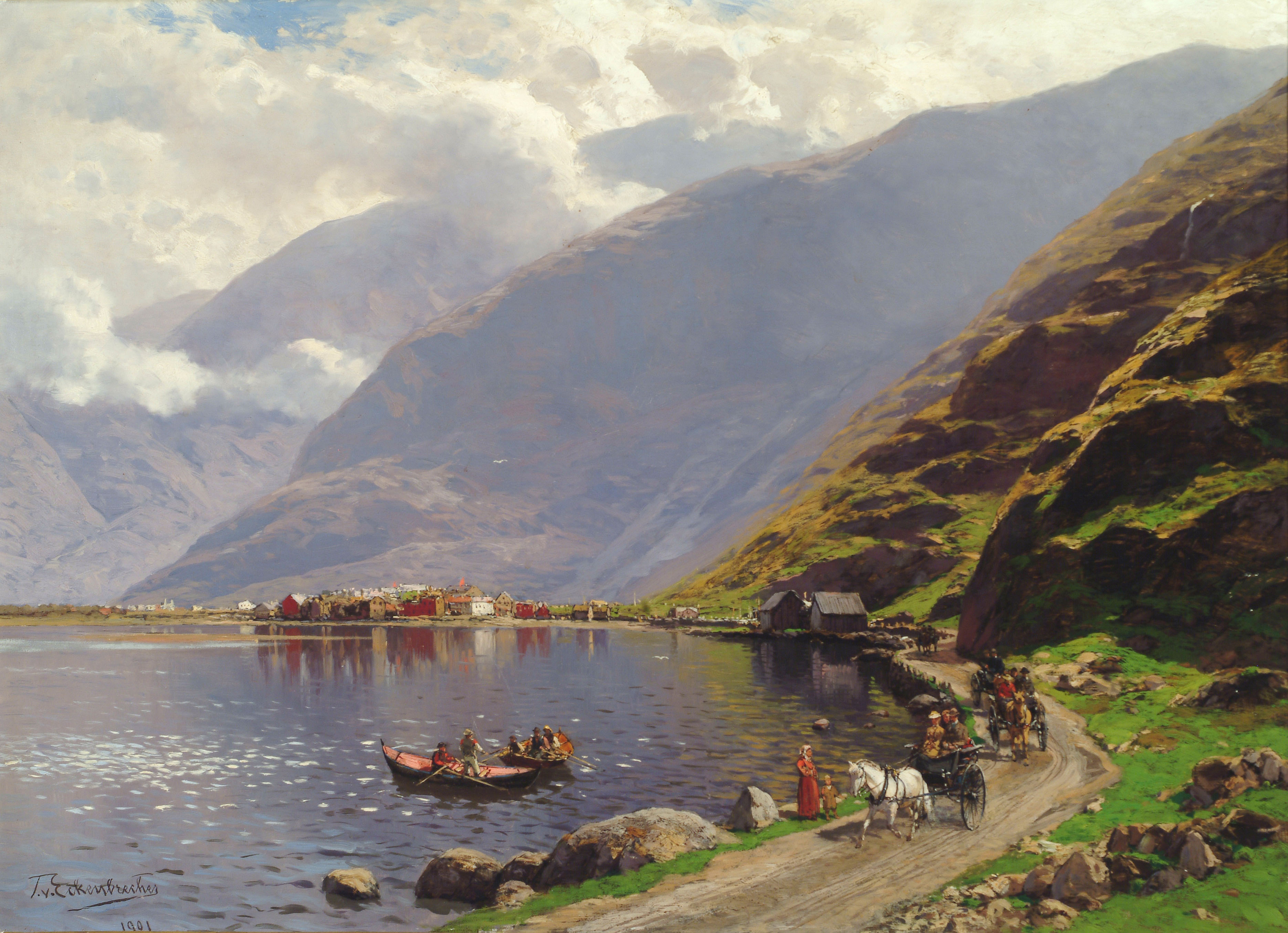 Themistokles von Eckenbrecher (1876-1935): Utsikt over Lærdalsøren, i Sognefjorden, olje på lerret 1901.